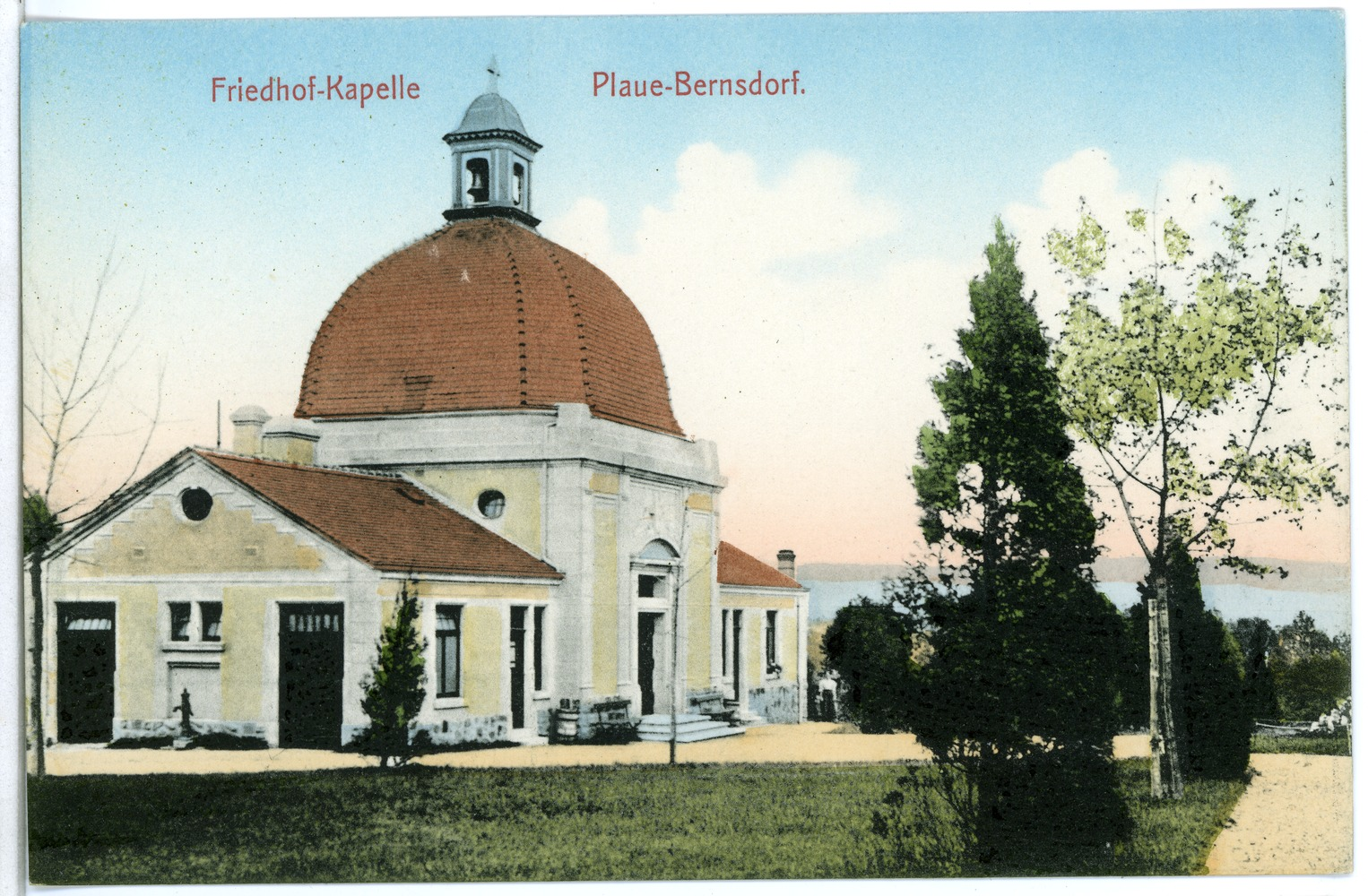 Plaue Bernsdorf; Friedhofs - Kapelle This postcard is from publisher Brück & Sohn in Meißen ( postcard has a unique number 11037 and is available in a higher resolution at the publisher. This images was uploaded in a cooperation project between Wikipedians and the publisher.